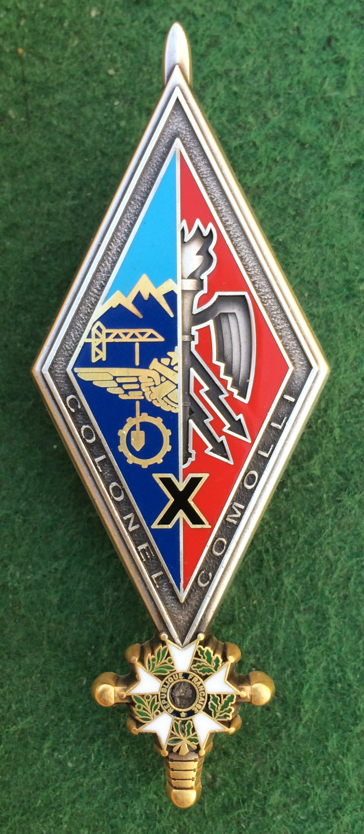 Insigne de la promotion ORSEM 2010 «colonel Yvan Comolli» (Arthus-Bertrand Paris). Le X parce qu'il était polytechnicien et la grue évoque d'abord qu'il est aussi ingénieur des travaux publics, après quoi il réalise notamment la station de ski de La Plagne (d'où la silhouette des montagnes et du ciel bleu). La roue dentée évoque ses responsabilités dans l'industrie du bâtiment et des travaux publics, ainsi qu'au tribunal de commerce de Paris. On reconnait par ailleurs à gauche l'insigne du régiment d'artillerie d'Afrique dans lequel il servit après être sorti de Cherchell comme aspirant; à droite, l'insigne de L'ESORSEM sur son fond rouge évoque sa qualité d'Orsem ; il fut même à la tête de la Réunion. La médaille militaire qu'il obtient à 22 ans en 1944 est représentée en bas sur l'épée, symbole d'une école d'officier.